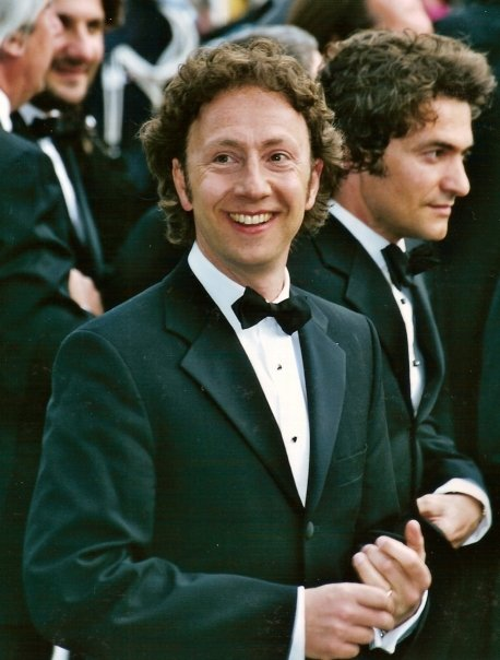 Stéphane Bern au festival de Cannes.